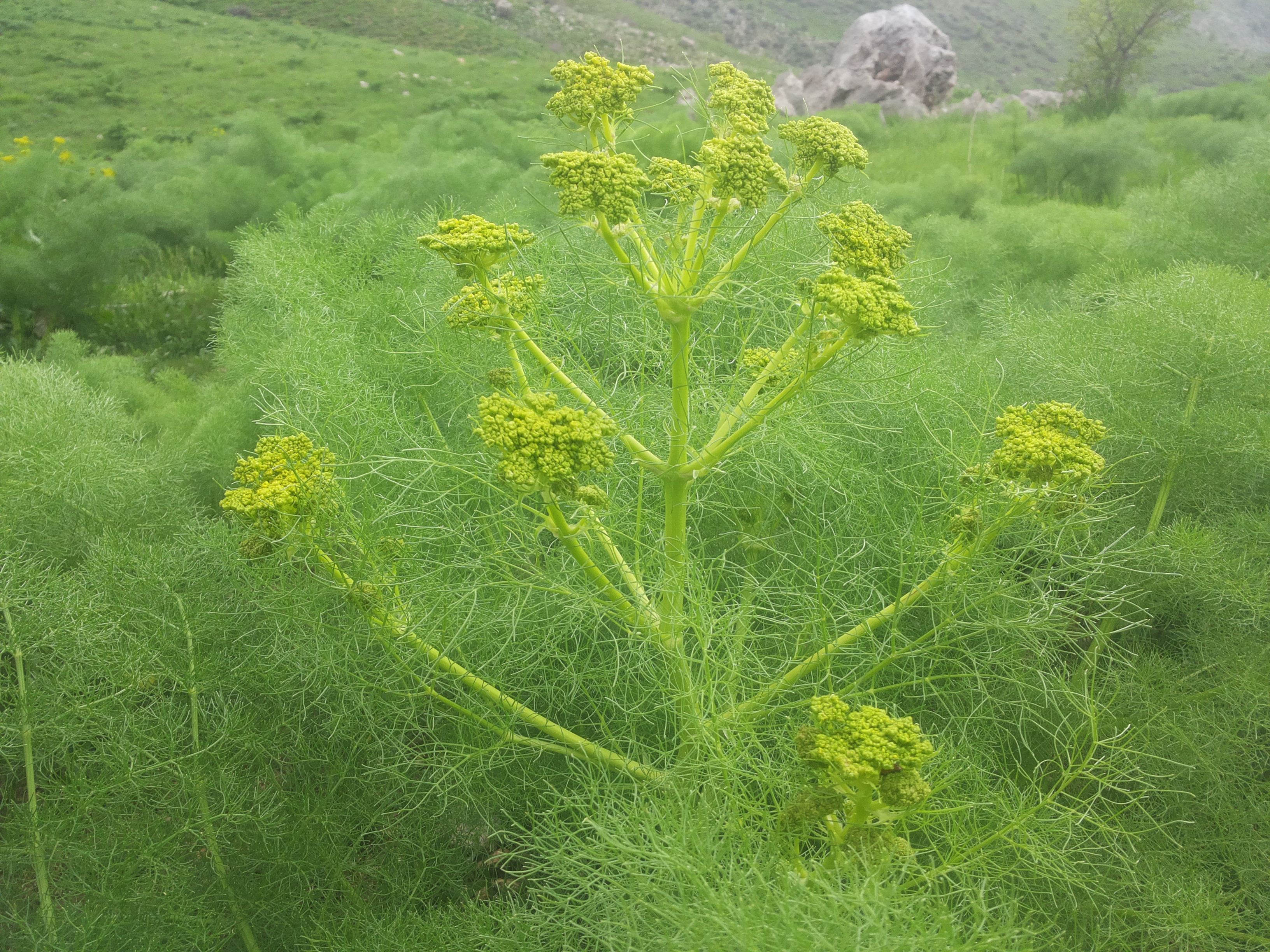 کوردی: گوڵ و لق و پۆپی لۆ